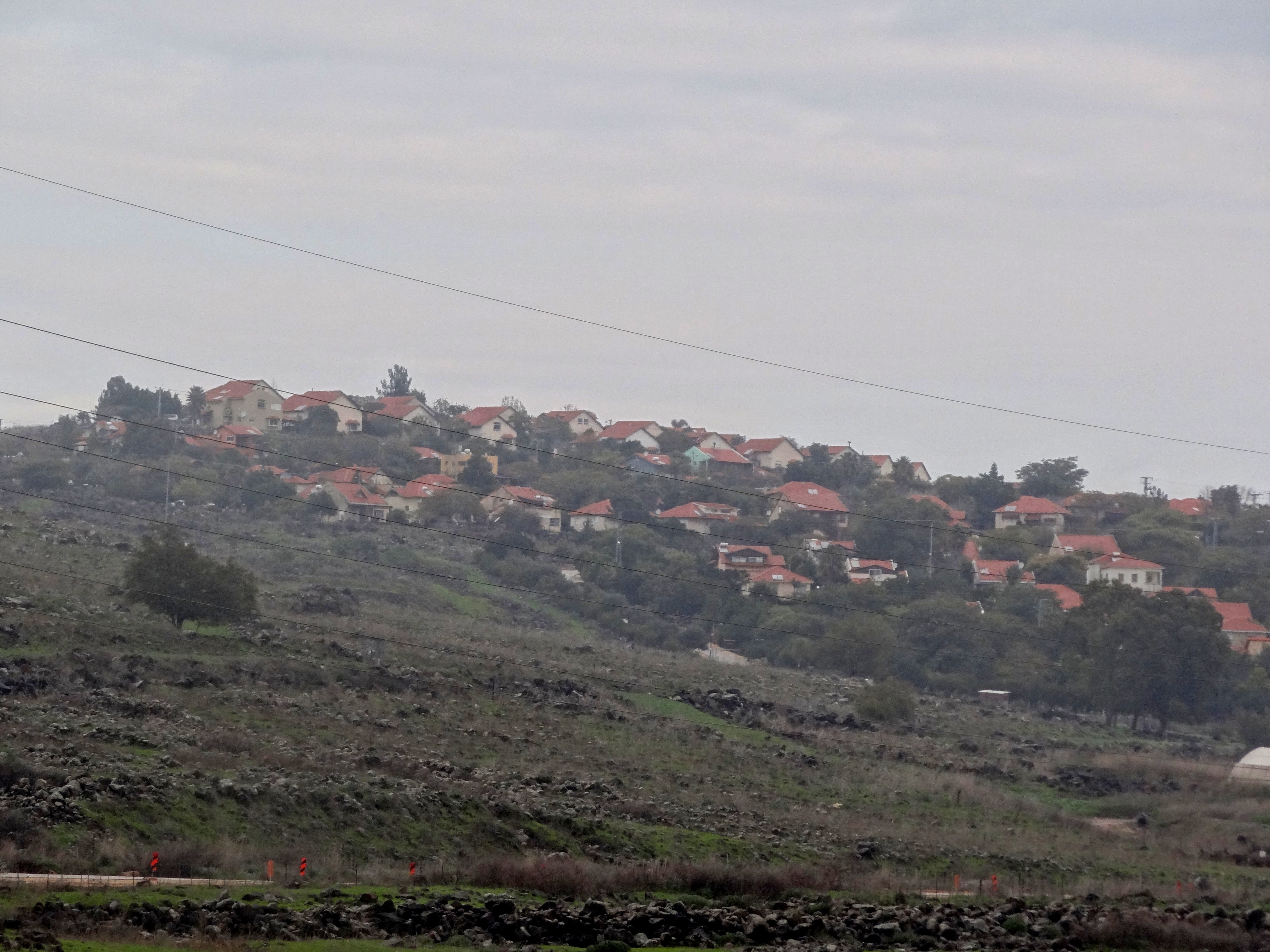 Karkom is a communal settlement in northern Israel near the Jordan River Israel כרכום הוא יישוב קהילתי ברמת כורזים, סמוך לערוץ הירדן ההררי מצפון לכנרת, בתחום המועצה האזורית מבואות החרמון.